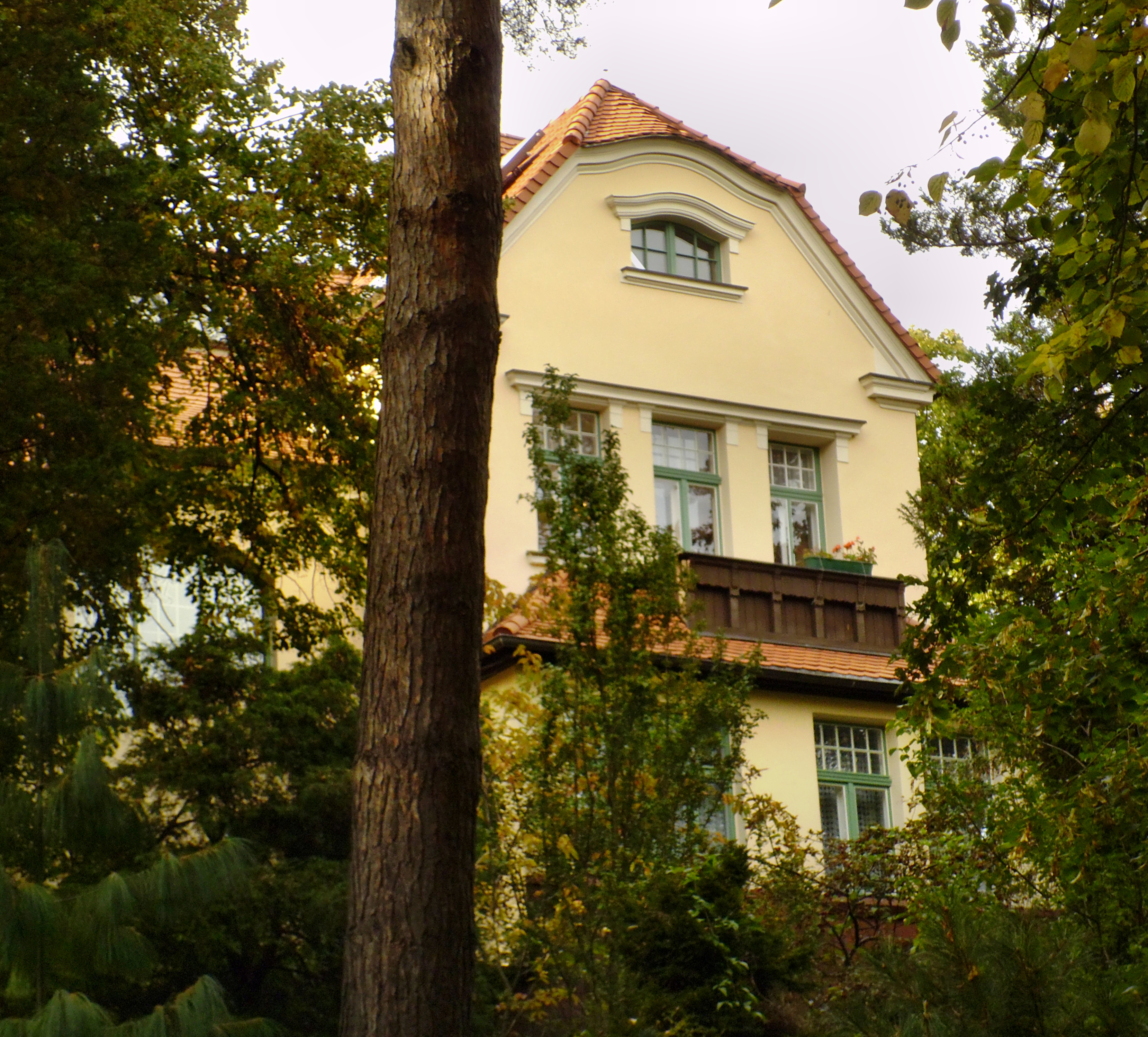 Zespół willowy (willa, garaż, ogród) ul. Mickiewicza 12, Sopot 08.1989.